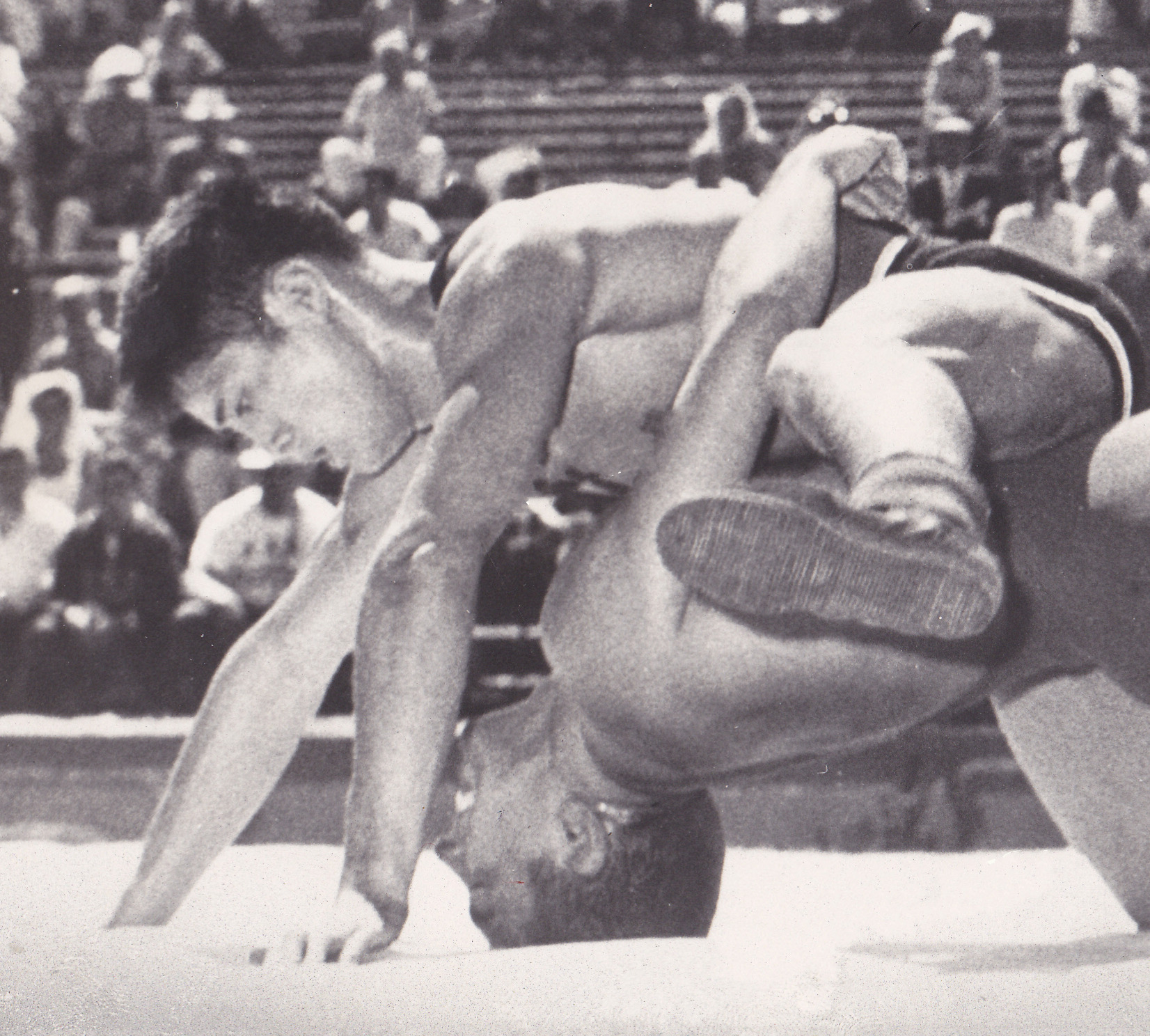 Masamitsu Ichiguchi vs Larry Lauchle, 1960 Olympics